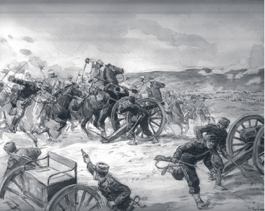 Reproducción fotográfica de un dibujo que representa la batalla de Placilla, última batalla de la Guerra Civil de 1891. Librada en las afueras del puerto de Valparaíso.